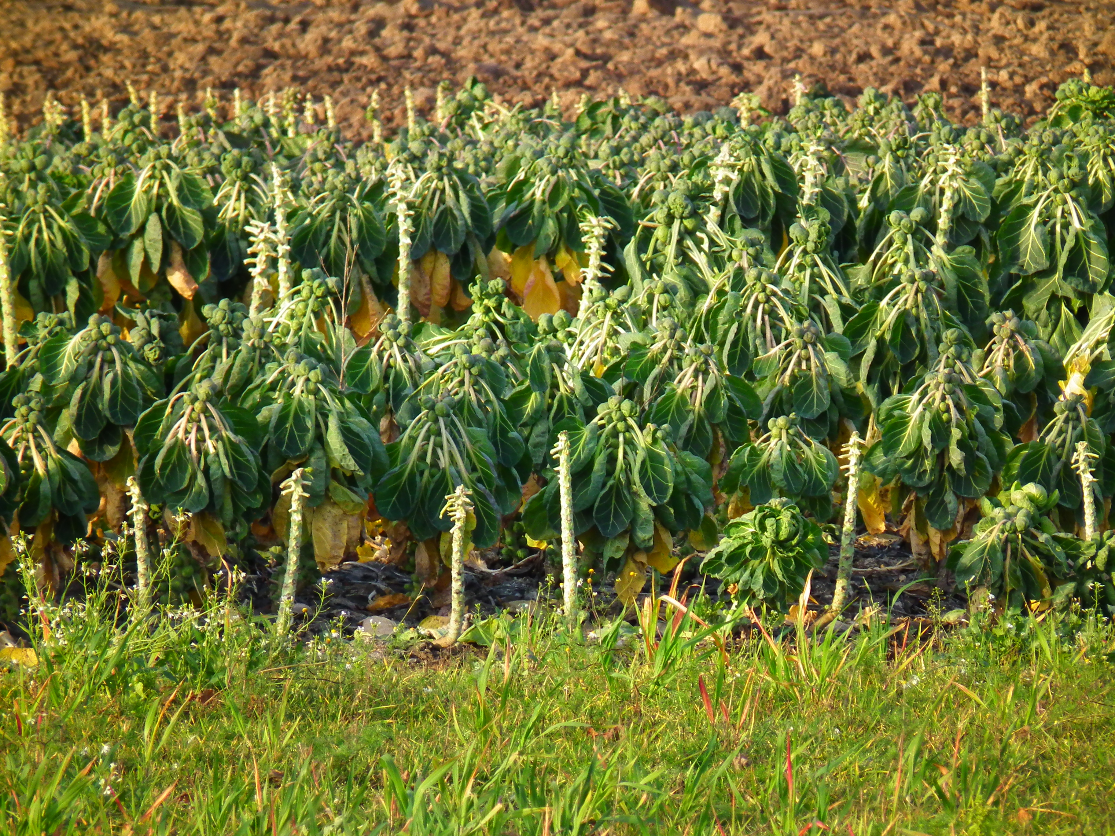 Rosenkohl (Brassica oleracea), fotografiert auf einem Feld in Heidelberg (Baden-Württemberg, Deutschland)